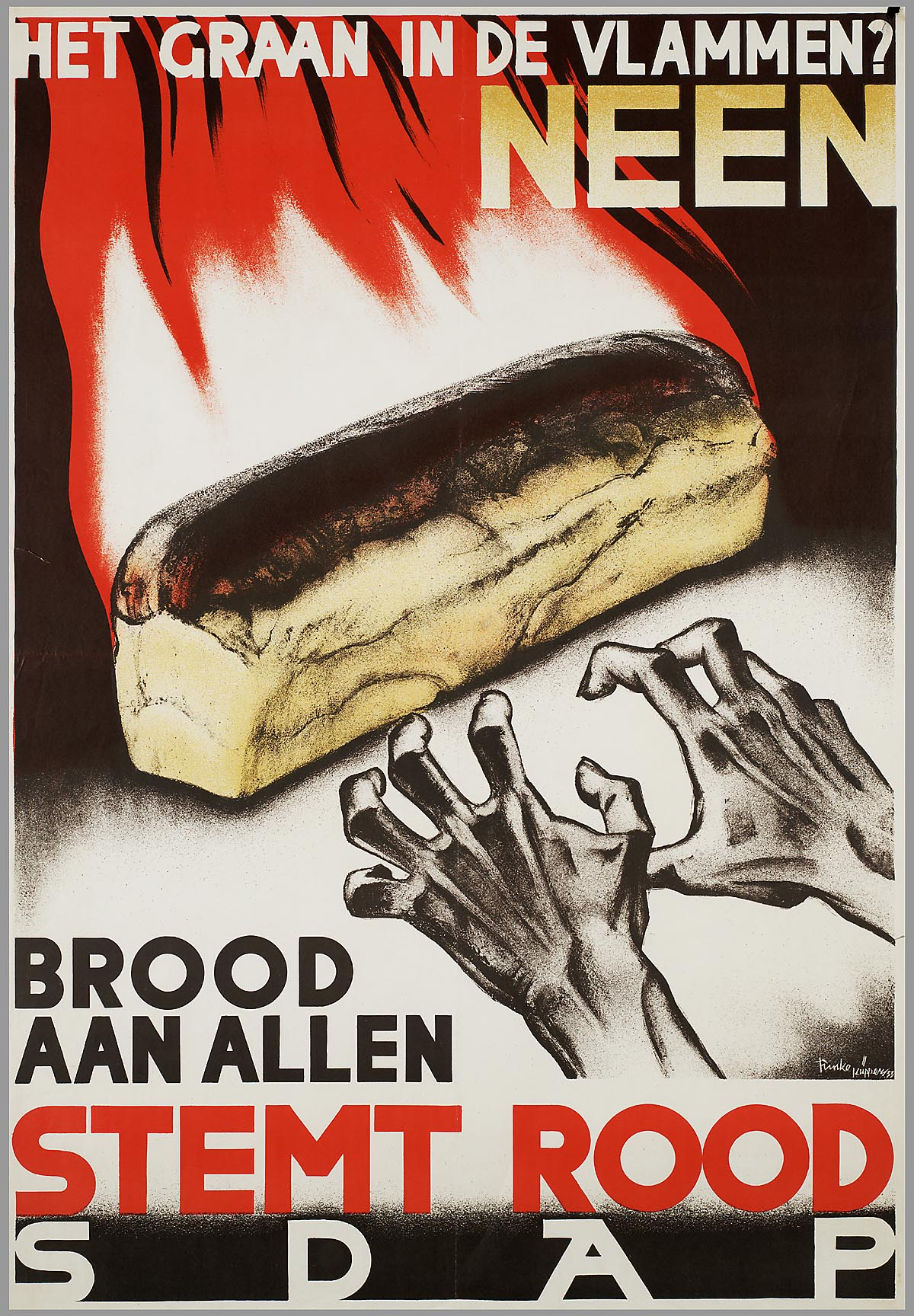 Affiche: Het graan in de vlammen? Opdrachtgever/adverteerder: SDAP.